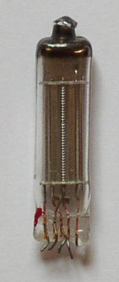 Miniatuur elektronenbuis uit extern gehoorapparaat uit de jaren 50; eigen foto; GFDL